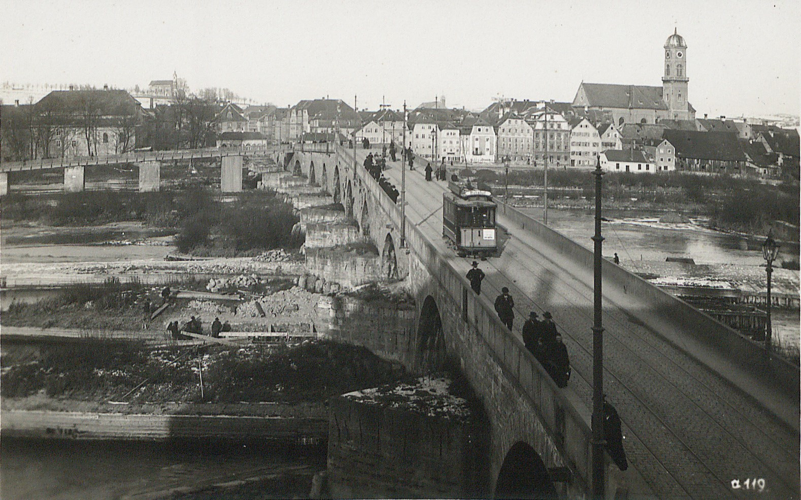 Ansichtskarte - Regensburg - Steinerne Brücke nach Norden - Straßenbahn (Staatliche Bibliothek, Sammlung historischer Ansichtskarten, A,X,29, 1903)